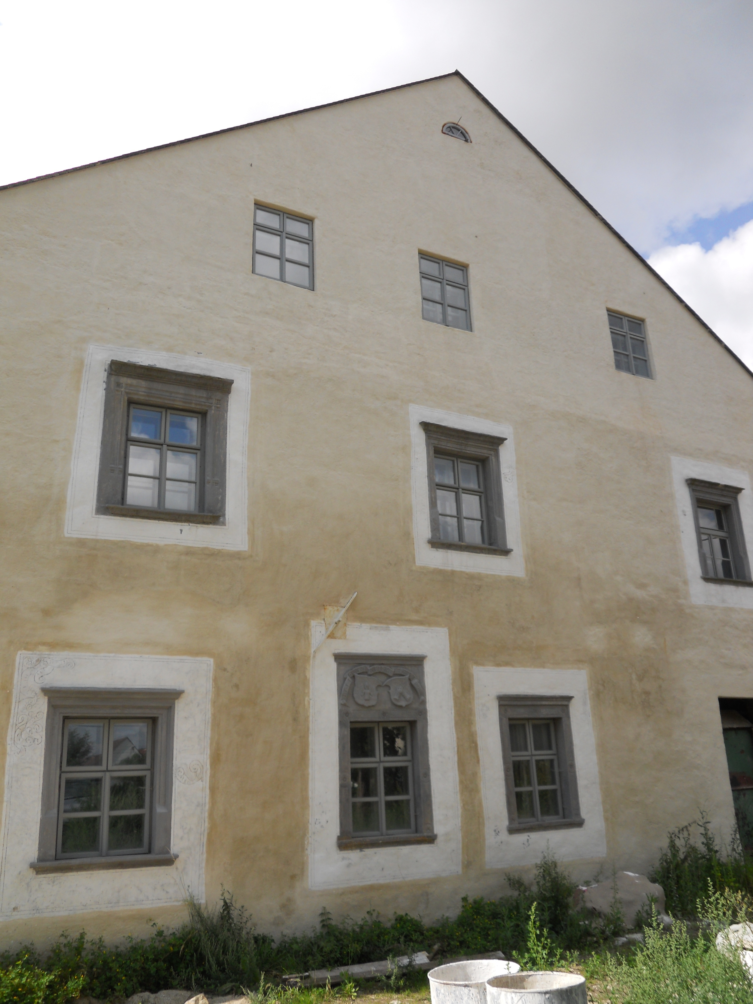 Česky: Průčelí trze Kobylků v Podolí. Nad oknem v přízemí rodový erb Kobylků z Kobylího s letopočtem 1551.